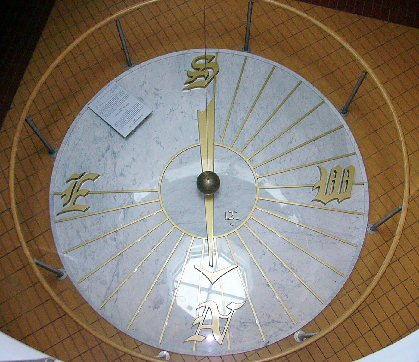 Wahadło Foucaulta w Poznaniu / Foucault pendelum in Poznań